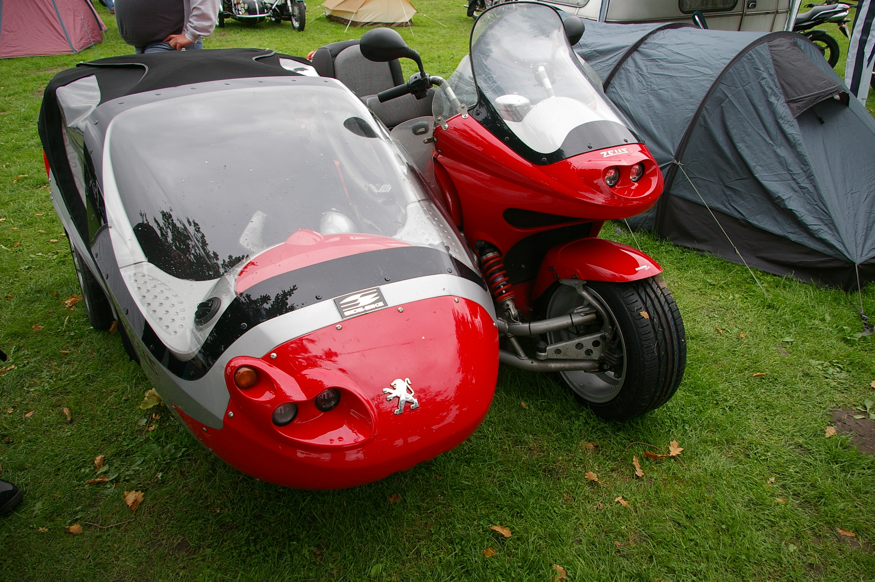 Reisegespann von "Zeus" mit Common Rail- Dieselmotor 110 PS von Peugeot